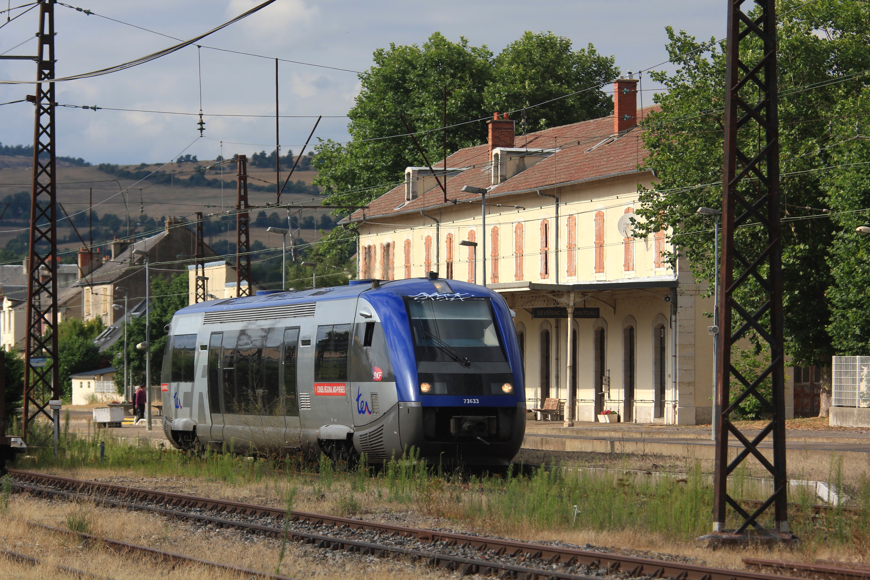 Le TER n° 870133 (Rodez 17h15 - Millau 18h30, circulant les samedis) assuré par l'X 73633 dessert la gare de Sévérac-le-Château.